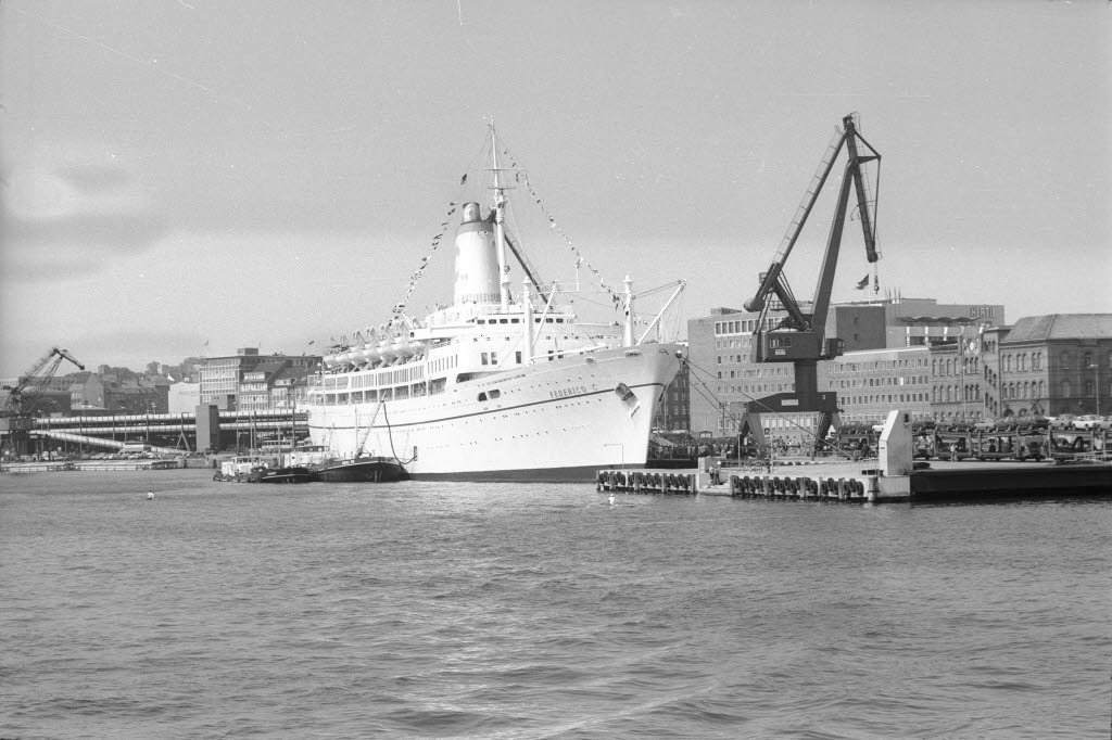 am Bollhörnkai zur Kieler Woche 1976. Längsseits die Ölschute SHELL und das Tankschiff FAVORIT.